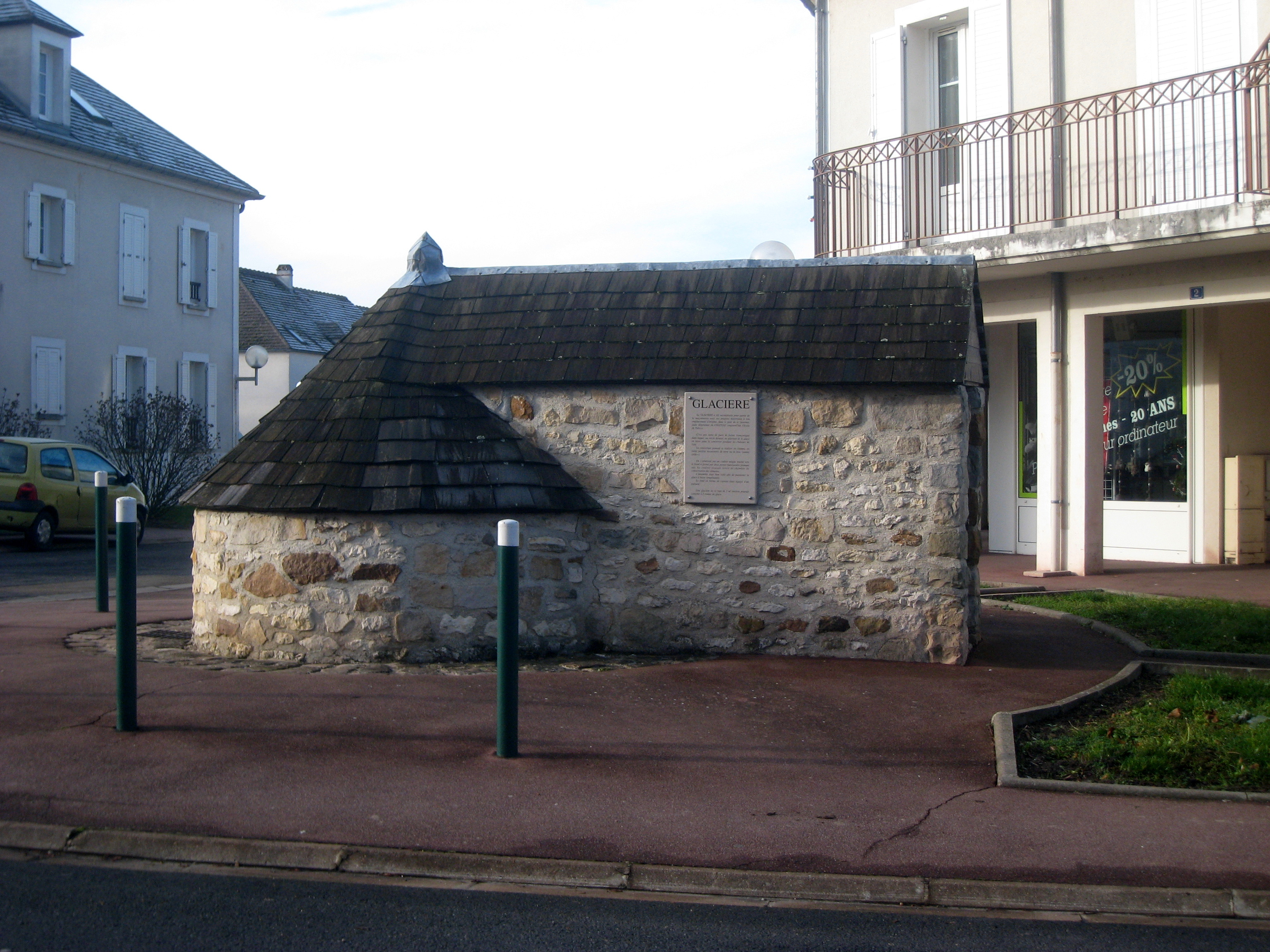 La glacière de Cannes-Ecluse (Seine et Marne)